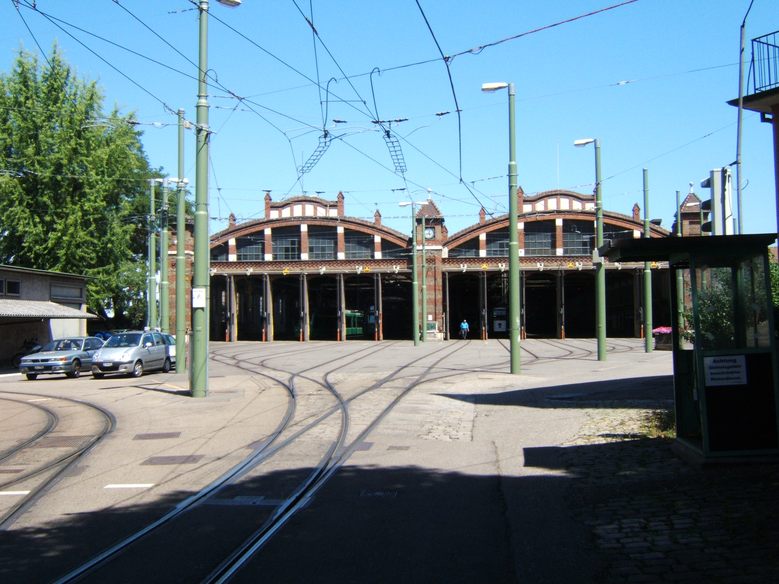 Bazel tramstelplaats Wiesenplatz.